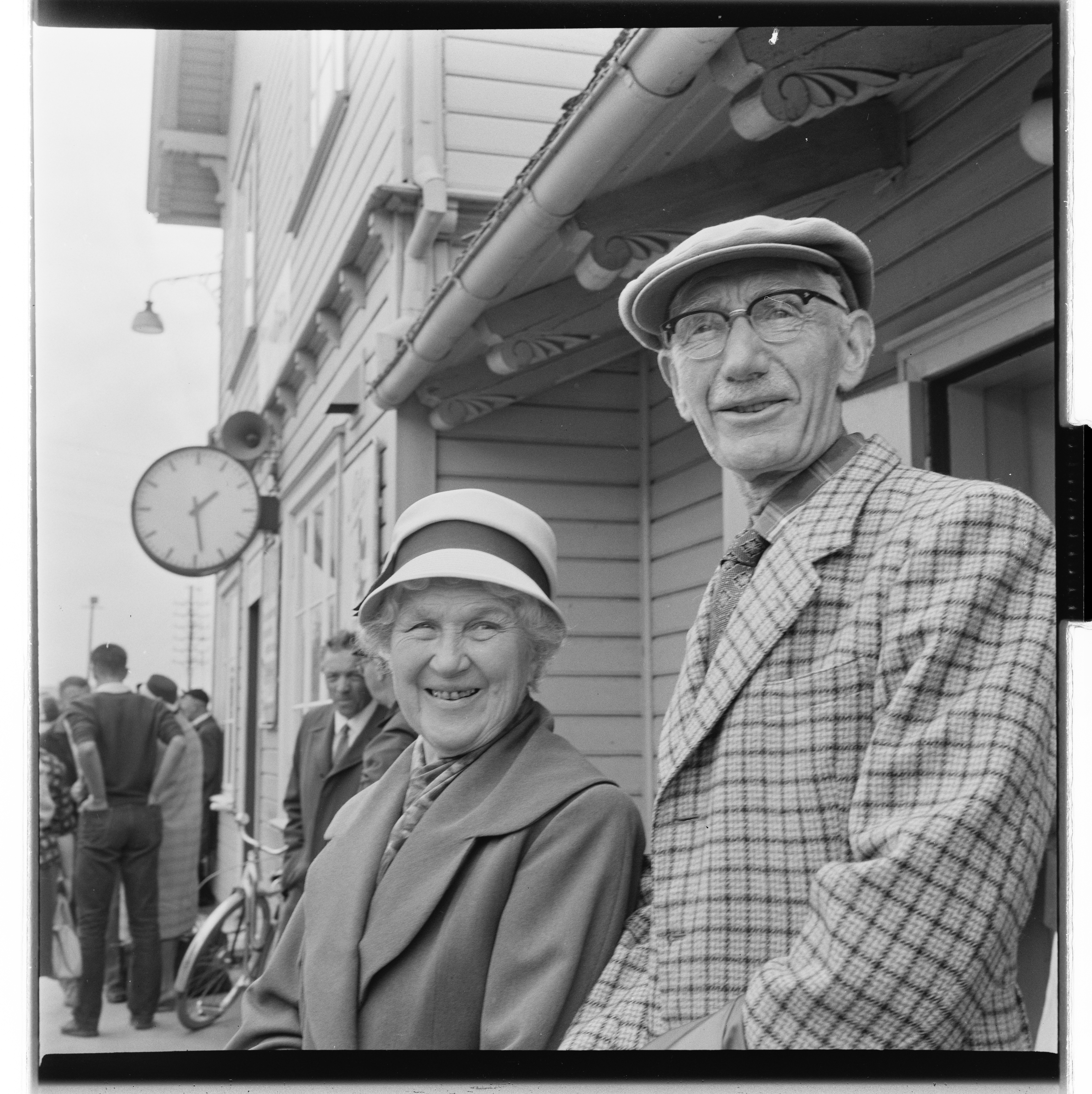 Bildet er hentet fra Arkivverket. Foto tatt i forbindelse med reportasje om den norske filmen Freske fraspark fra 1963. Manus var ved Kjell Aukrust og Bjørn Breigutu. Regi ved Bjørn Breigutu. Kjell Aukrust, Leif Juster, Turid Caldwell, Alfhild Hovdan, Per Bistrup, Lalla Carlsen Arkivinstitusjon : Riksarkivet Arkivnavn : Billedbladet NÅ Sted : Norge, Hedmark, Alvdal, Emneord: Film, Filminnspilling, Kvinner, Menn Avbildet